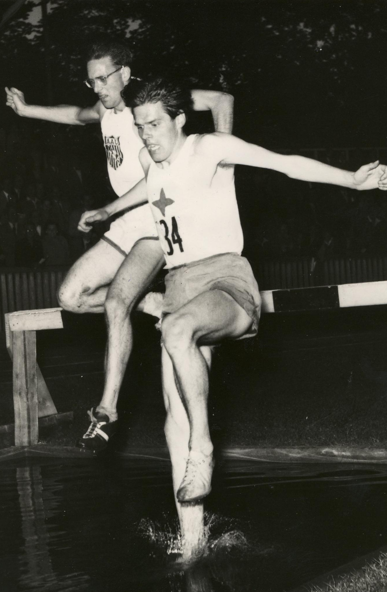 Tore Sjöstrand